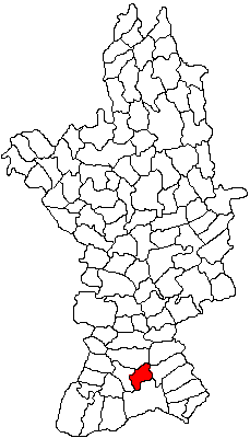 Categorie:Hărţi ale judeţului Olt